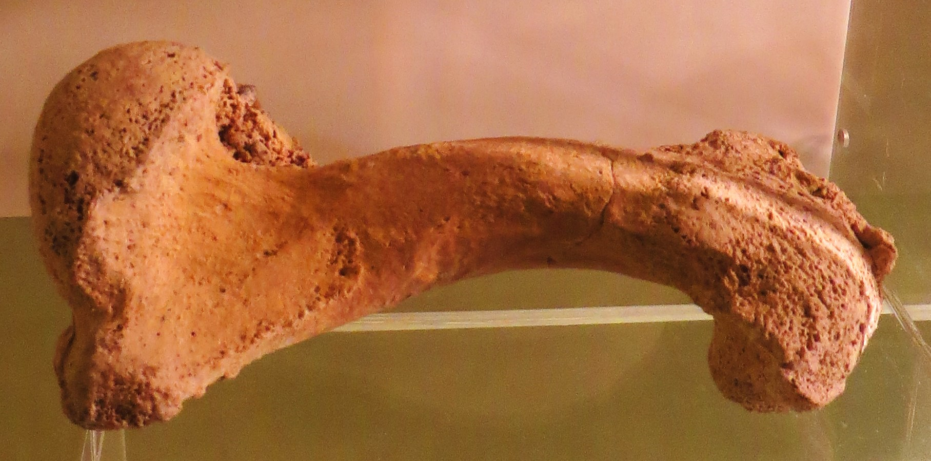 Fossil of Geochelone, an extinct reptile- Took the picture at Museo de la Naturaleza y el Hombre - Tenerife